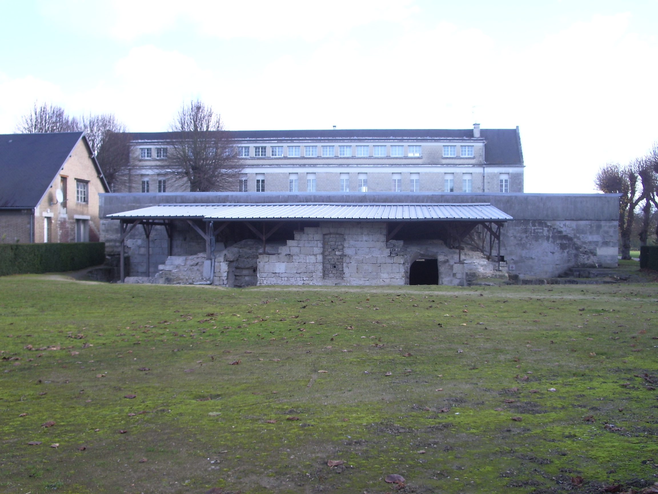 St. Medard Soissons, Kryptaruine